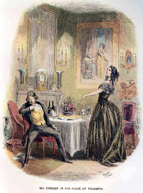 Dombey and Son, Mr Carker en butte au défi d'Edith en France (chapitre 54)